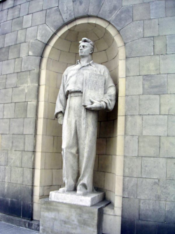 Pałac Kultury i Nauki - Rzeźba